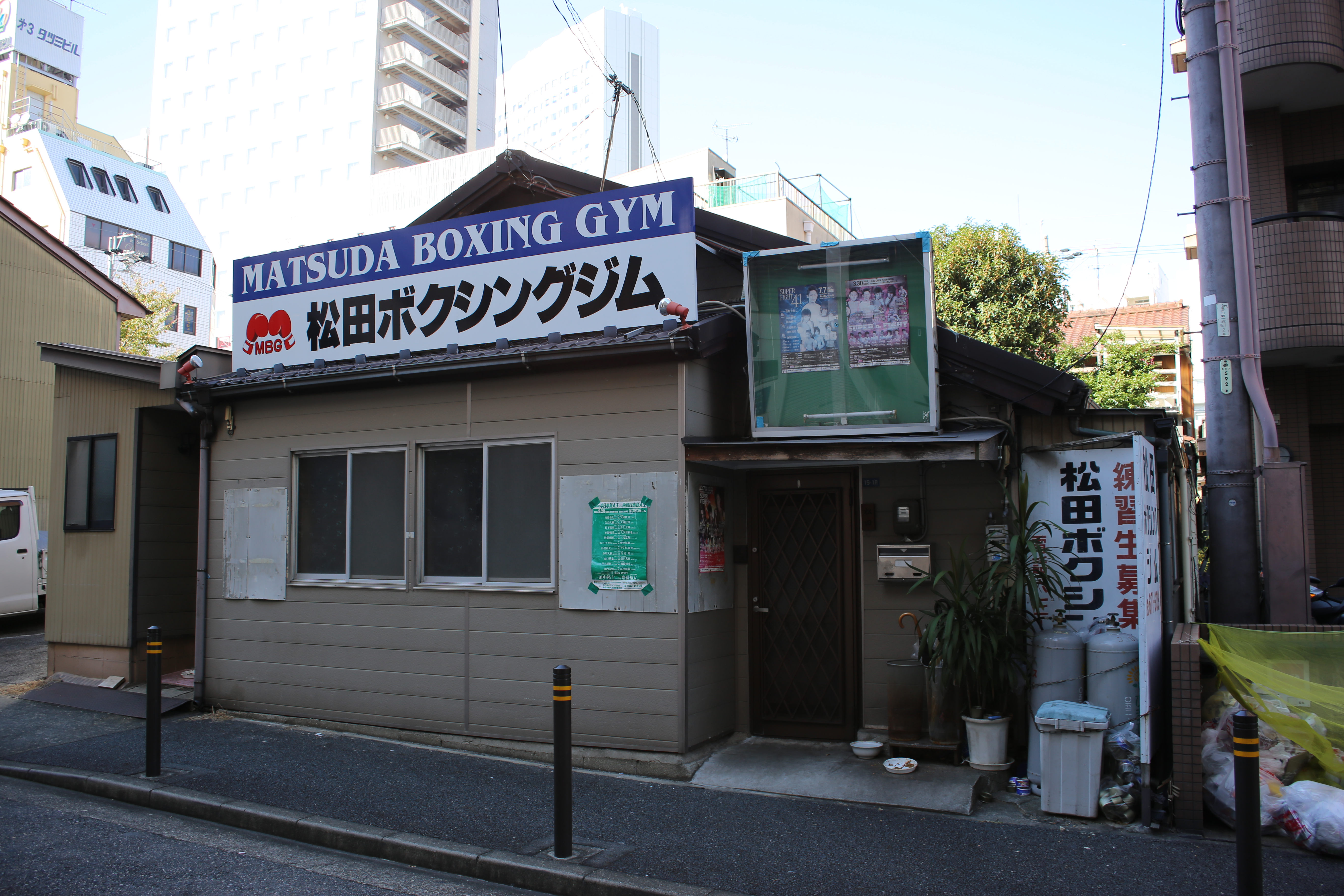 名古屋市熱田区金山町一丁目の松田ボクシングジムを南側公道東側より撮影